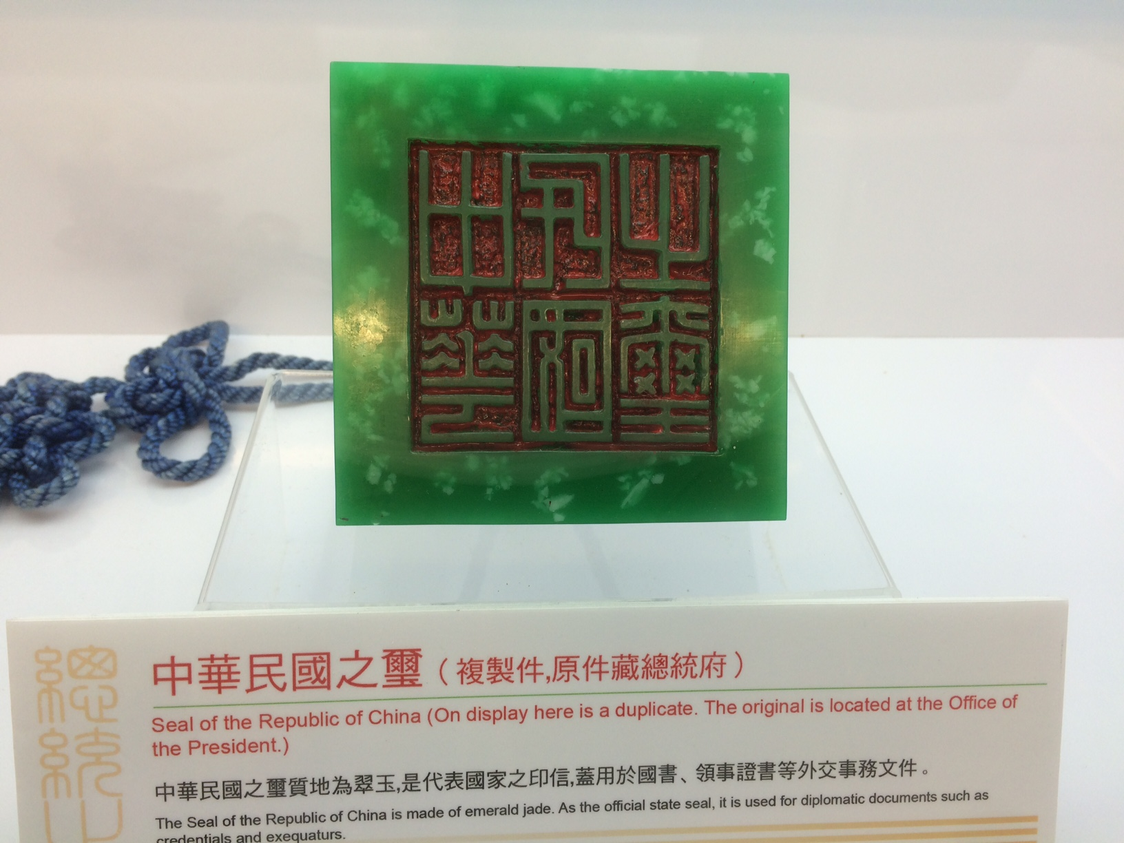 中華民國之璽複製件及其解說牌，原件由中華民國總統府收藏。美國之音齊勇明拍攝。